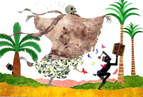 Representação de Ikú encantado pelos gêmeos Ibeji, retirado do livro "Ifá, o adivinho" de Reginaldo Prandi.